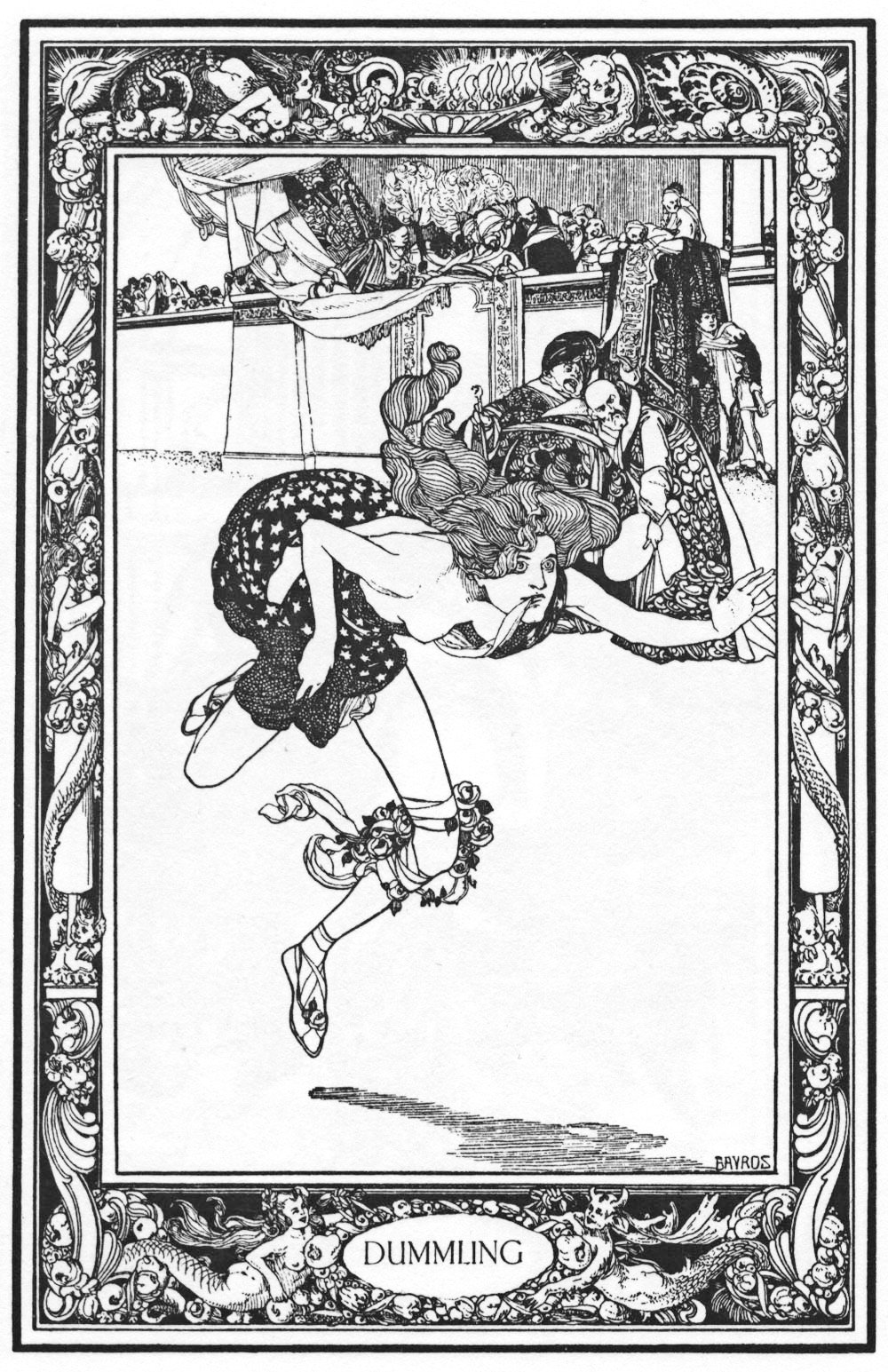 Illustration for Giambattista Basile's "Pentamerone".